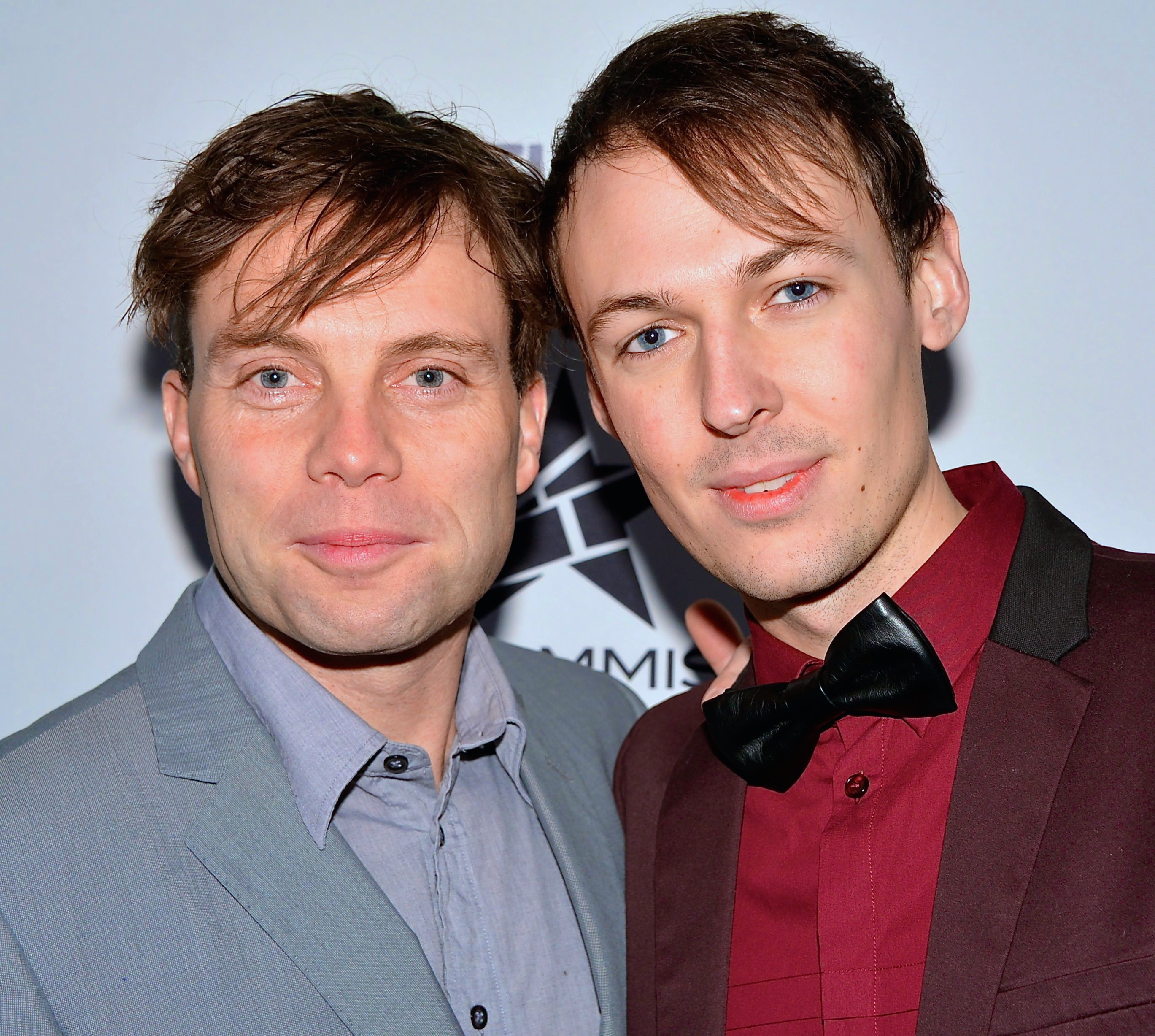 Henrik Olsson och Oskar Målevik på Grammisgalan på Cirkus, Stockholm den 20 februari 2013.